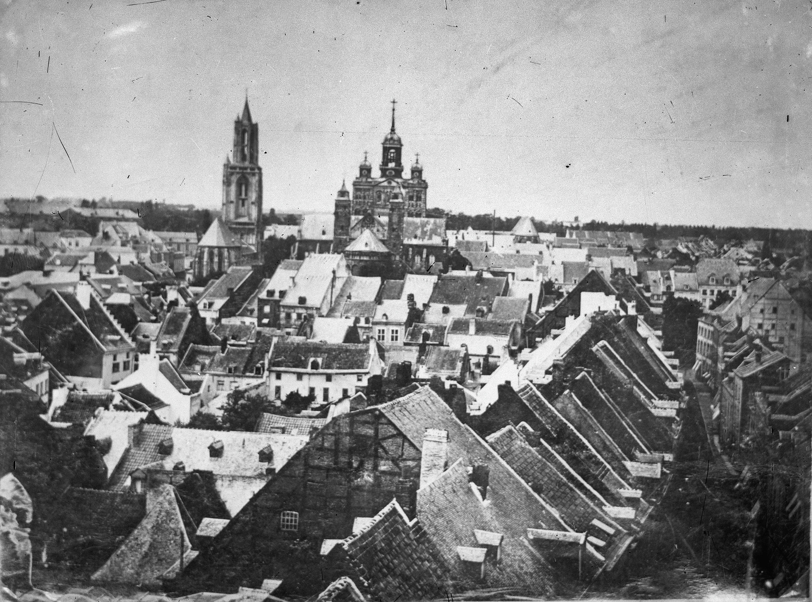 Overzicht: Panorama vanaf Dinghuis naar Sint Servaas, oude foto vroegere spits op Sint Servaas